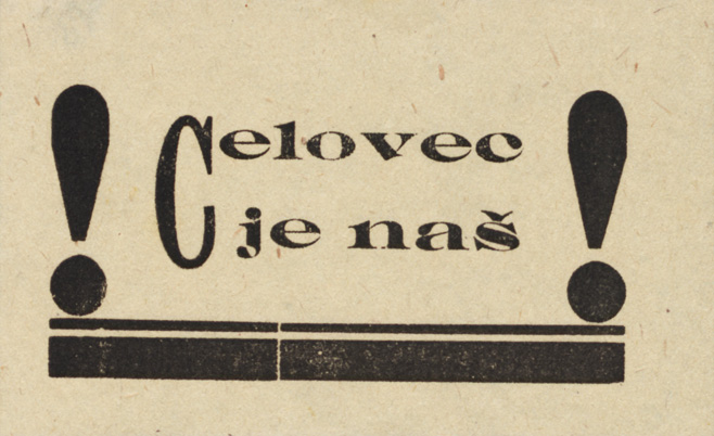 Nalepka ob plebiscitu Celovec je naš!